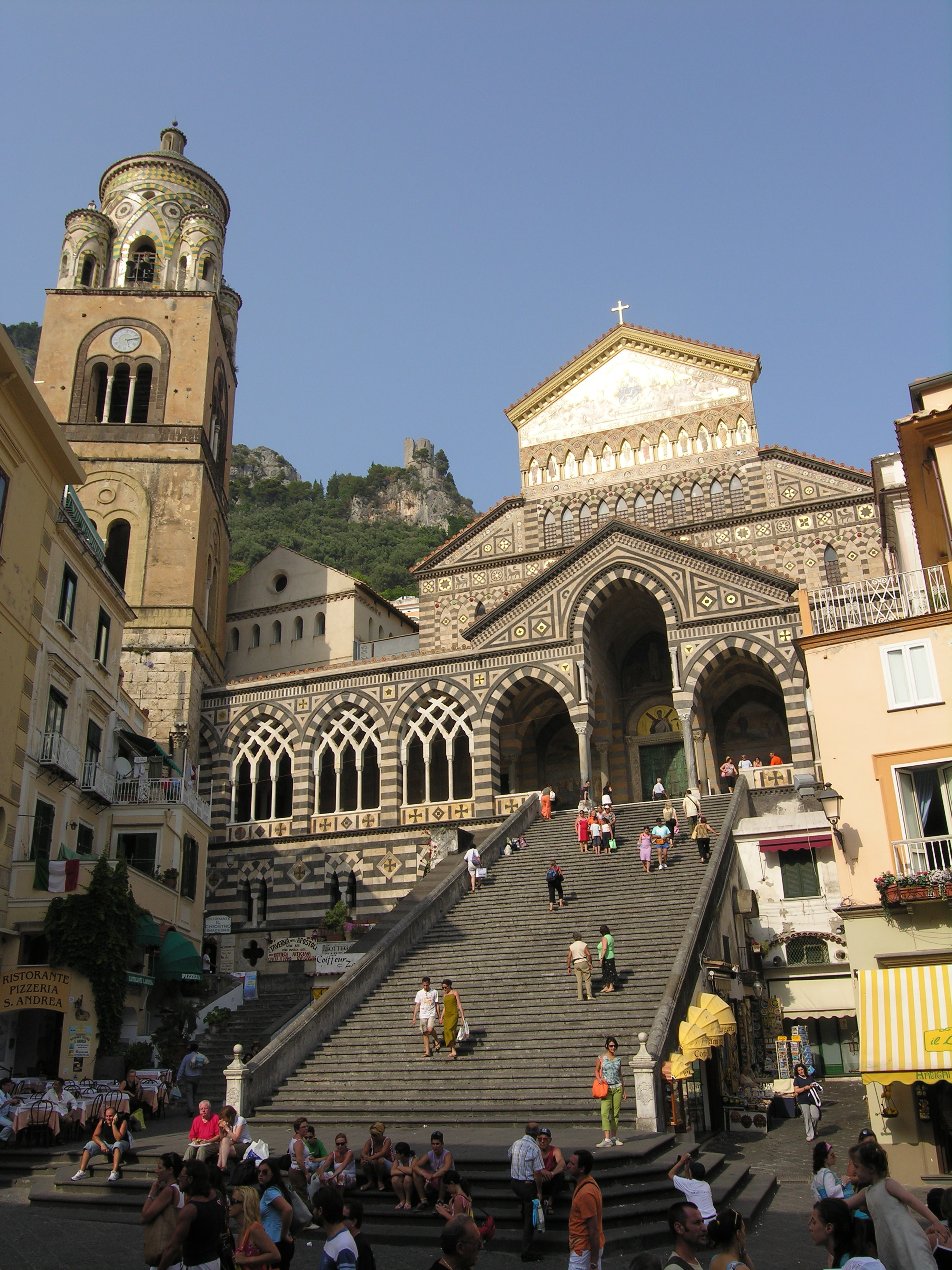 Amalfi, Piazza del Duomo, Italy, june 2006. 1880s ca. 2006.